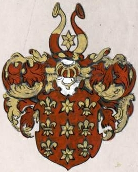 Drentelni suguvõsa aadlivapp